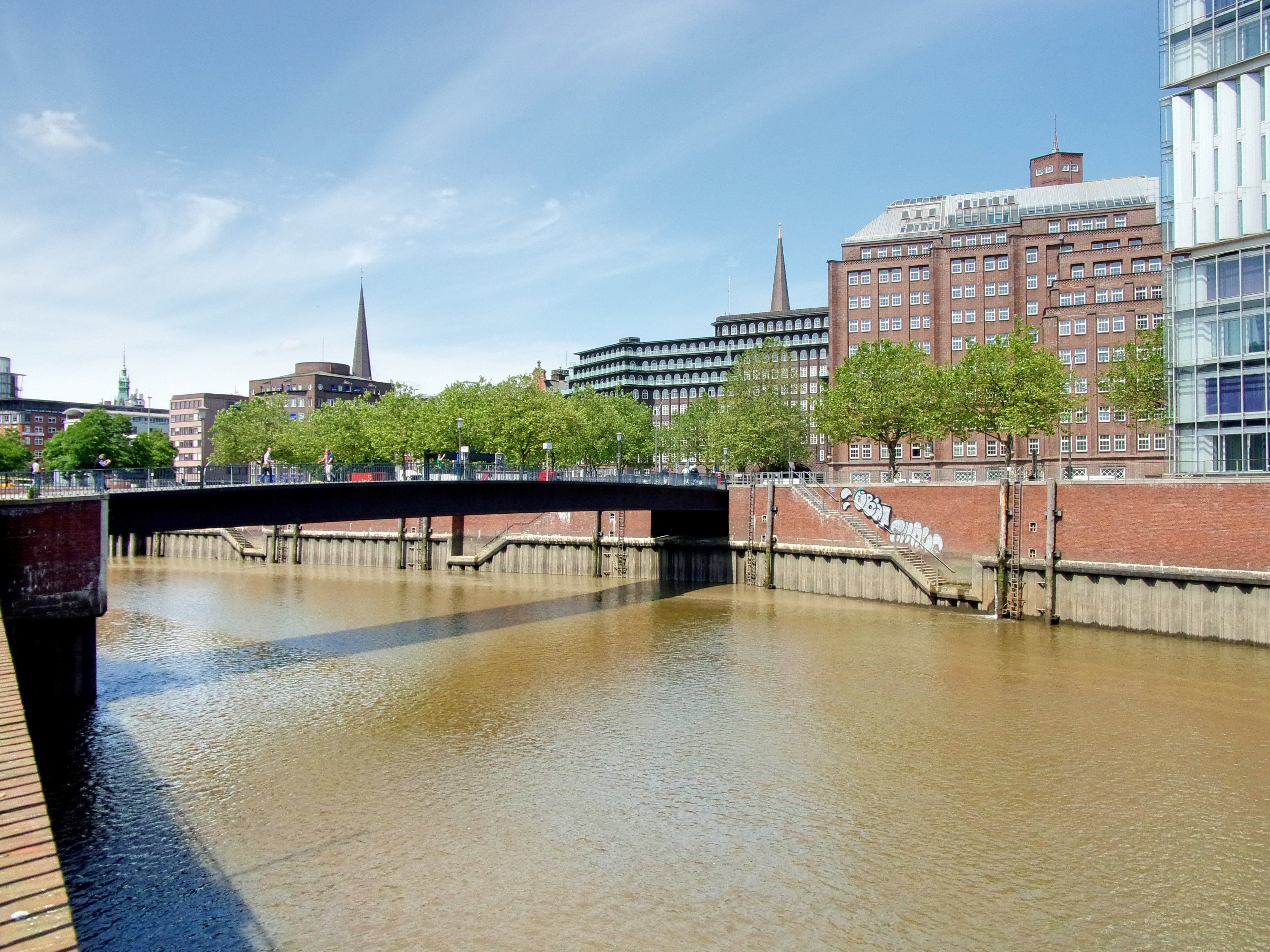 Der Wandrahmsteg ist eine Fußgängerbrücke über den Zollkanal in Hamburg-Altstadt zwischen der Willy-Brandt-Straße und dem Teerhof. Erbaut 1962. This is a photograph of an architectural monument.